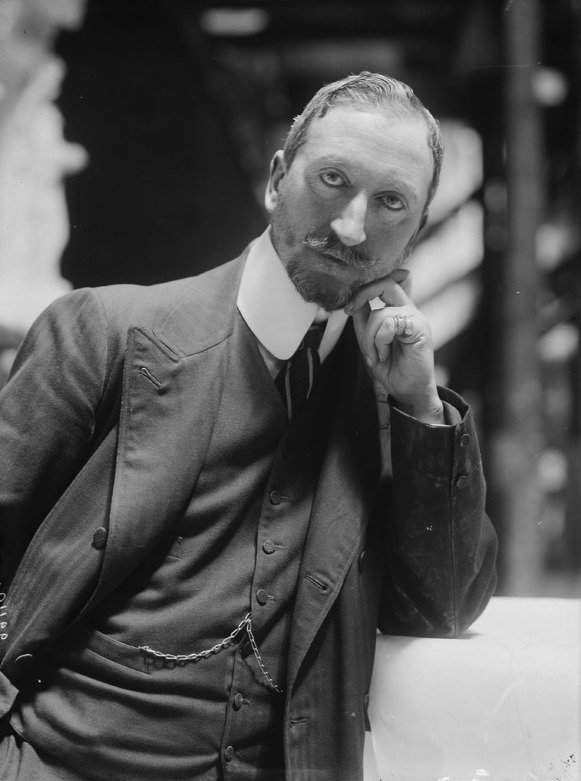 Manfredo Manfredi fotografato da Mario Nunes Vais